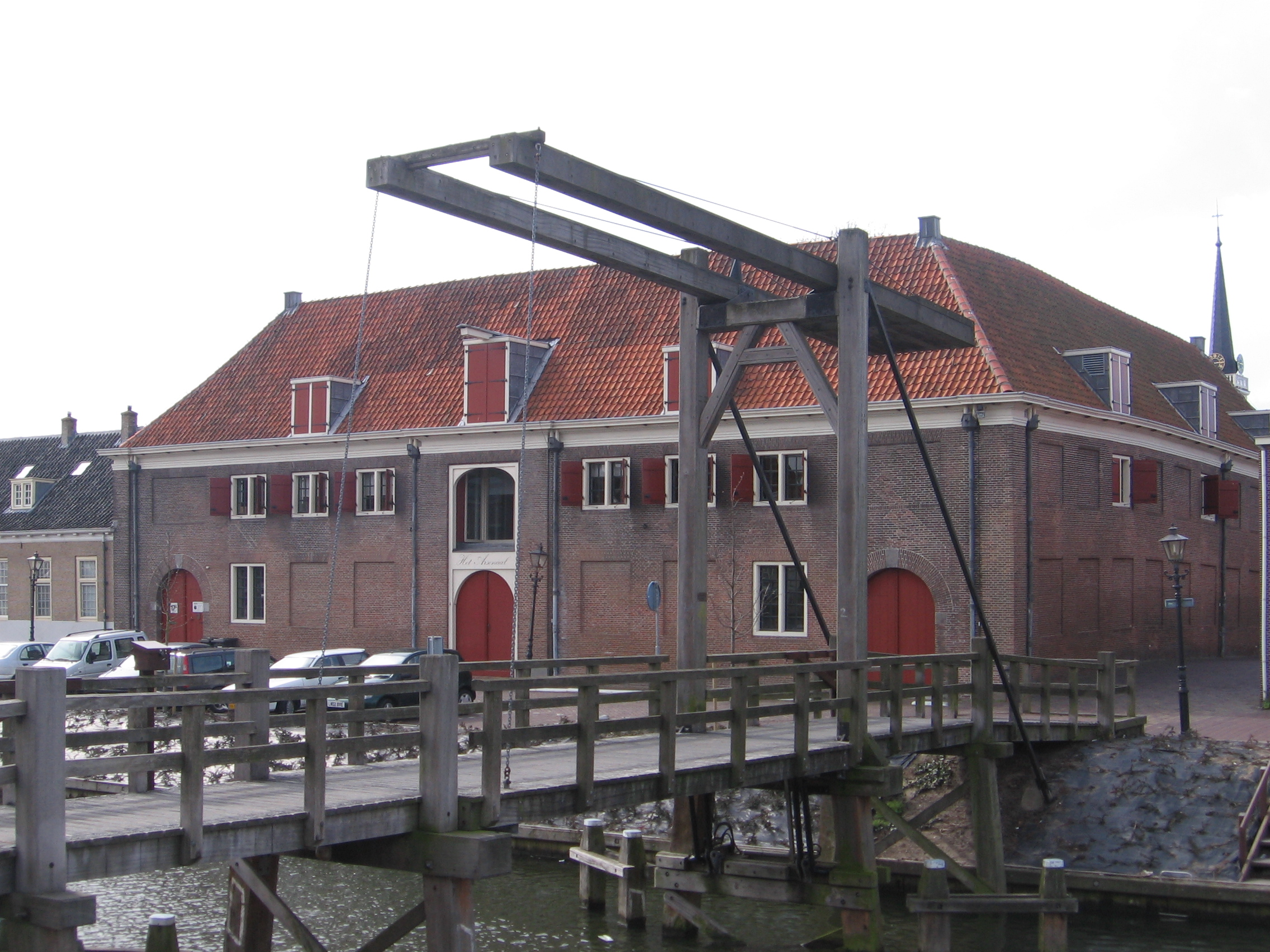 Brielle